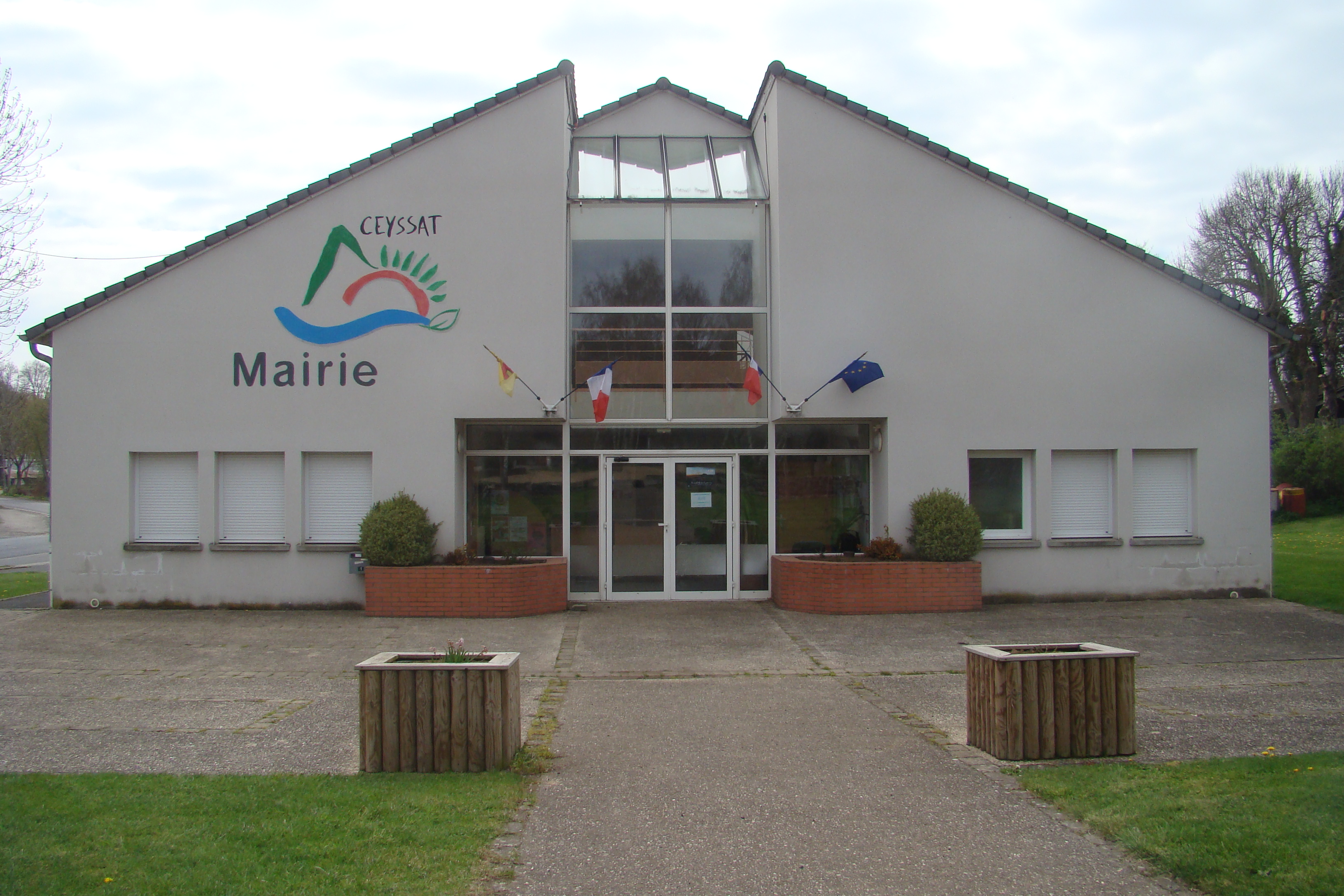 FACADE